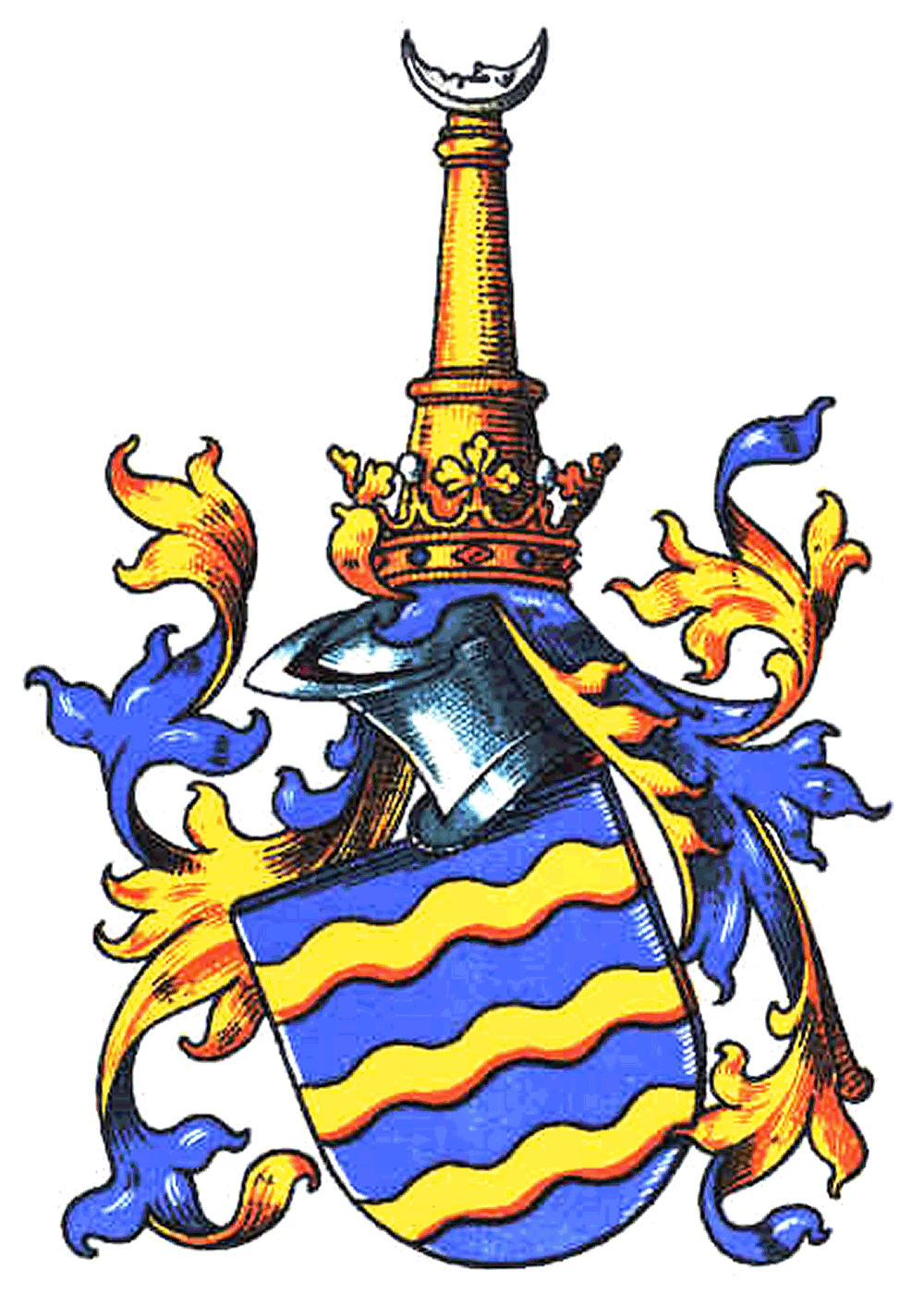 Wappen der lüneburg-mecklenburg-pommerschen-schlesischen von Thun